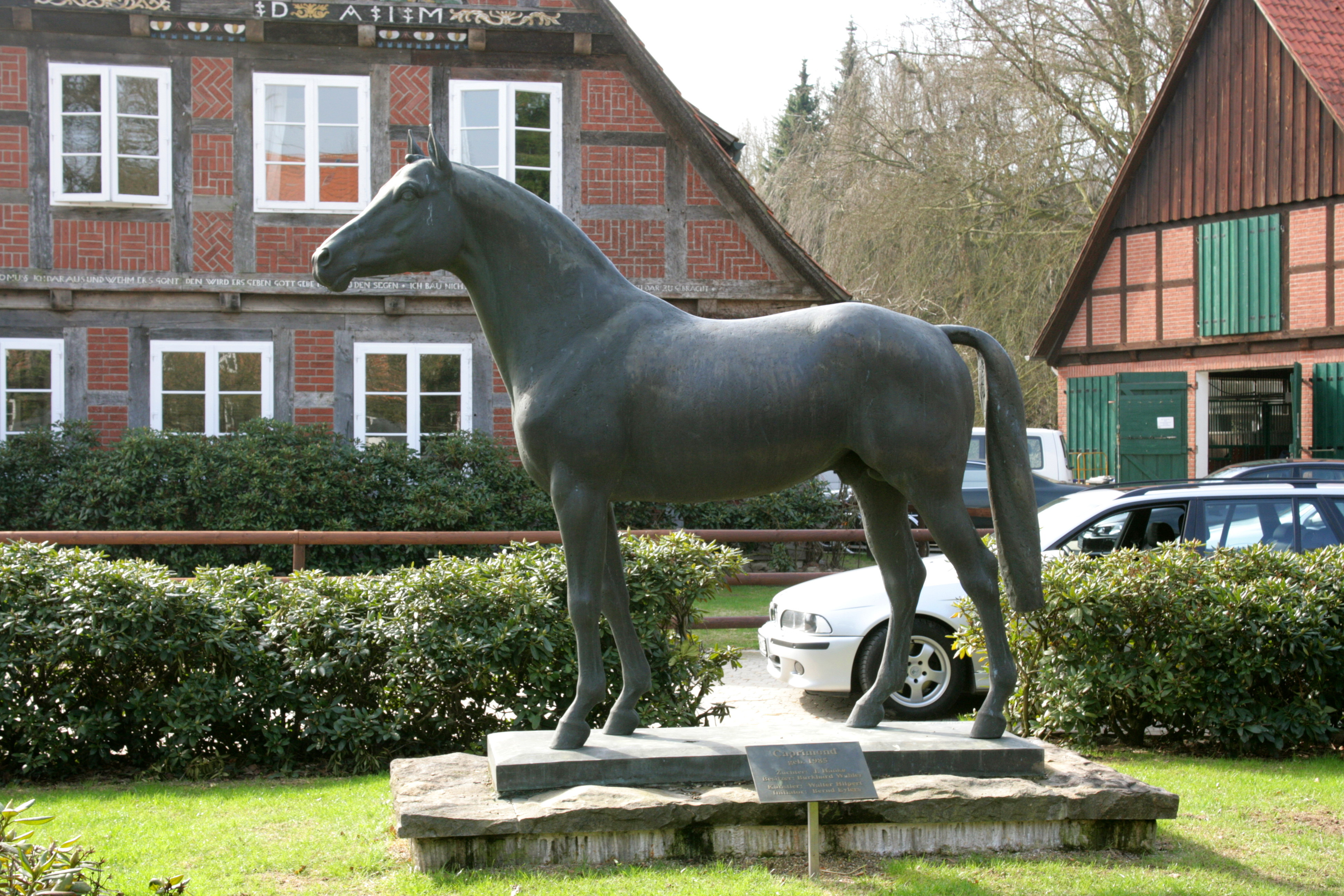 Gestüt Klosterhof an der Mühlenstraße in Medingen, Bad Bevensen